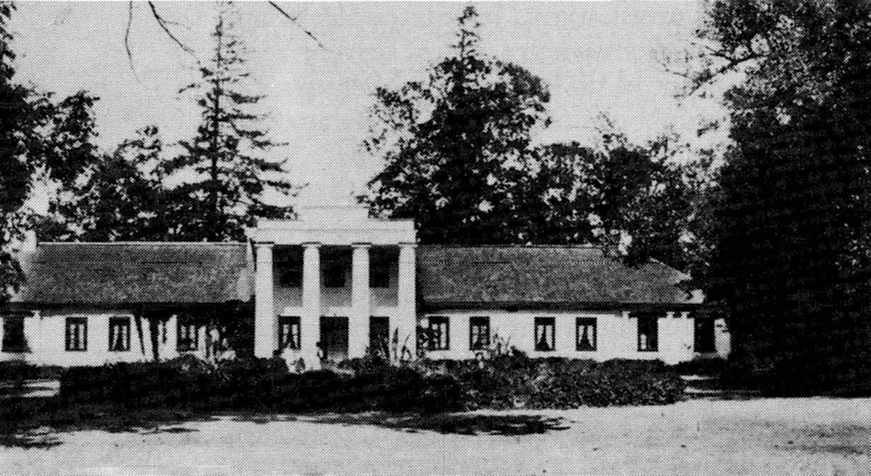 Беларуская (тарашкевіца): Масты (Masty), Зальвяны (Zalviany). Сядзіба Крывіцкіх (Kryvicki)